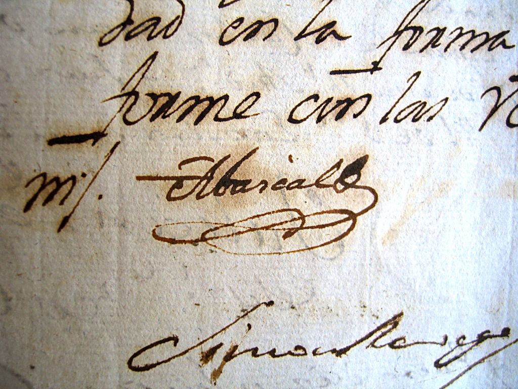 Firma de José Fernando de Abascal